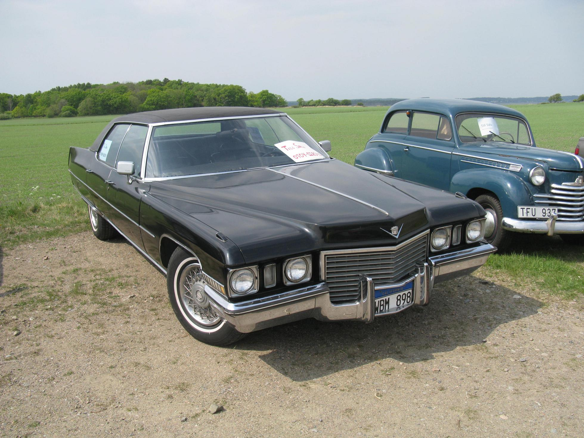 Cadillac De Ville 1972